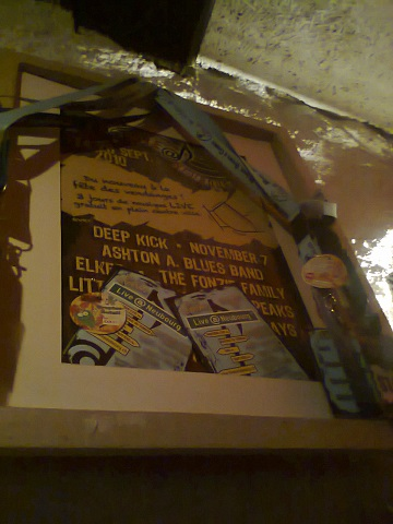 Deep Kick